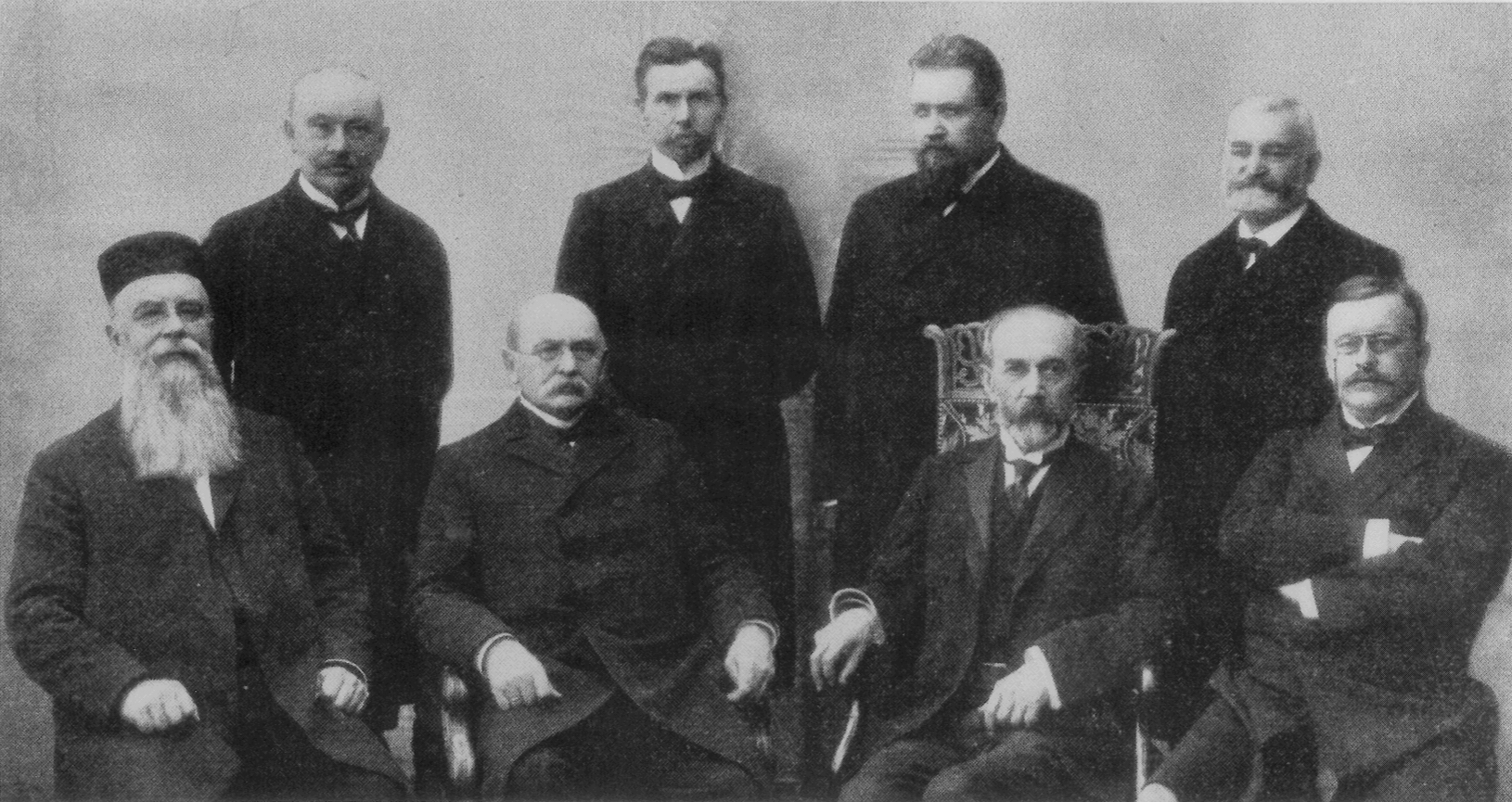 Filen er feilaktig merket Gunnar Knudsens regjering 2, men viser hans første omkring 1908-1909. Regjeringa satt fra 19. mars 1908 - 2. februar 1910 og hadde i perioden litt ulike medlemmer. Fra venstre: 1.Karl Seip 2. Nils Claus Ihlen 3. Gunnar Knudsen 4. Lars Abrahamsen 5. Hans Konrad Foosnæs 6. Wilhelm Christophersen 7. Haakon Ditlef Lowzow 8. Johan Castberg